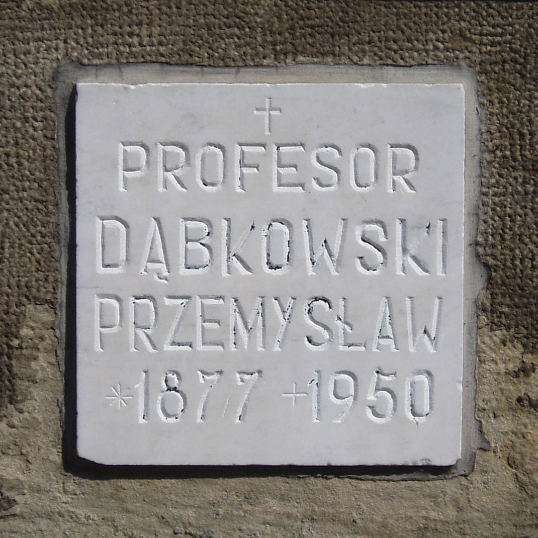 Надгробок родини Кшечуновичів на Личаківському цвинтарі.